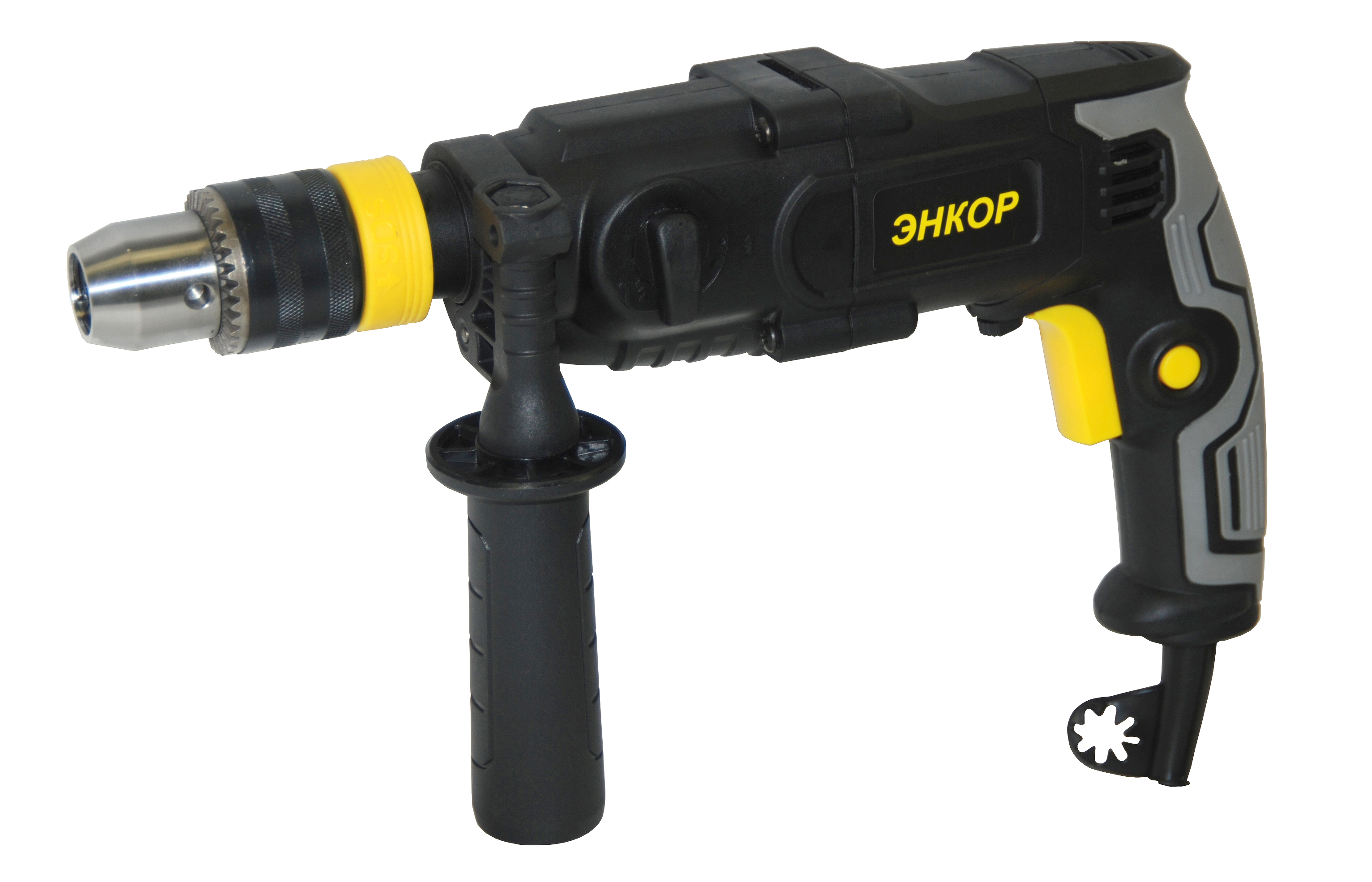 Перфоратор с комбинированным патроном SDS-plus/3-хкулачковый